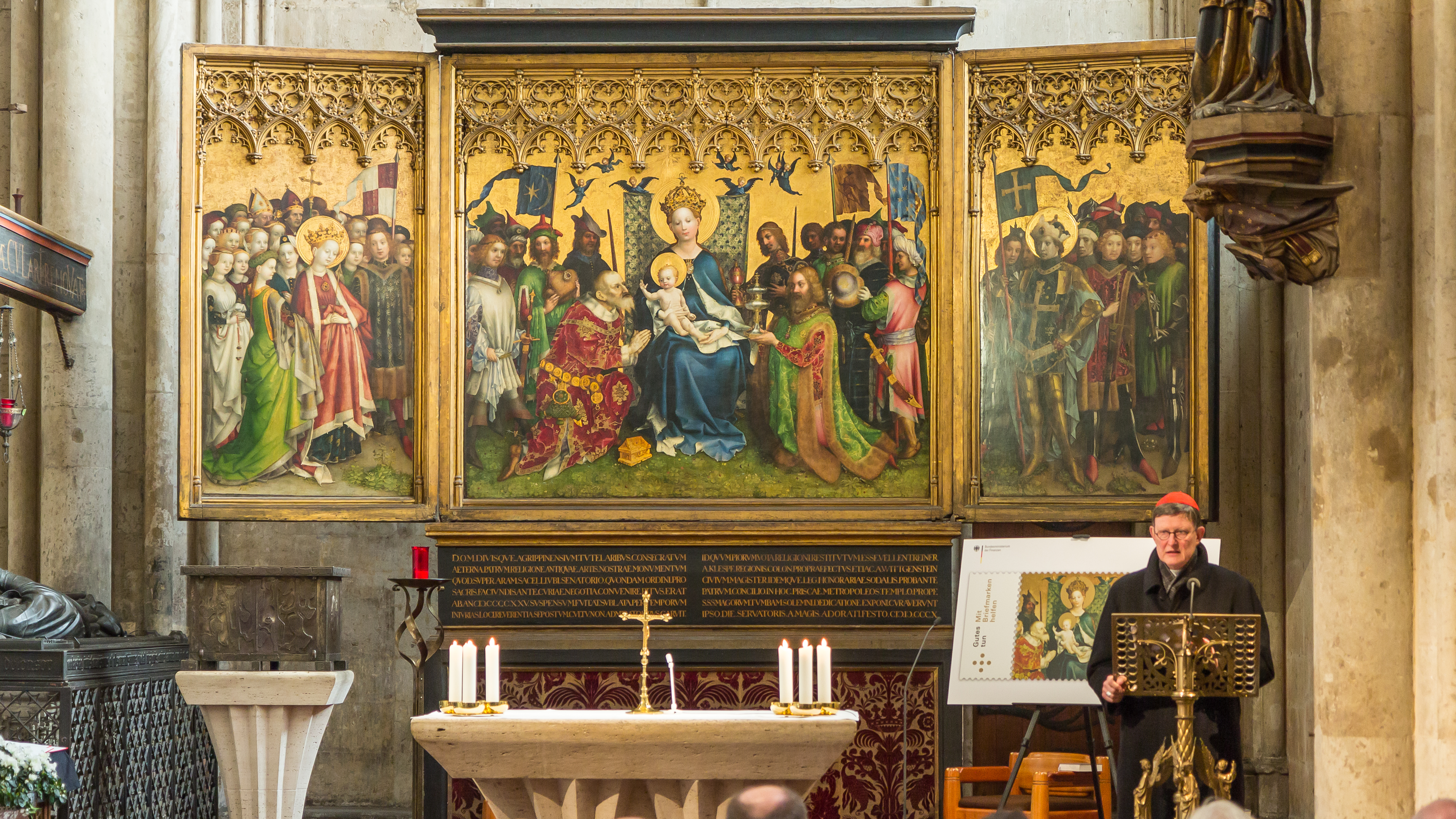 Vorstellung der Sonderbriefmarke „Weihnachten 2017“. Das Postwertzeichen zeigt einen Ausschnitt des von Stefan Lochner gestalteten Altars der Stadtpatrone in der Marienkapelle des Kölner Doms. Foto: Geistliches Wort zum Motiv des Postwertzeichens: Rainer Maria Kardinal Woelki, Erzbischof von Köln